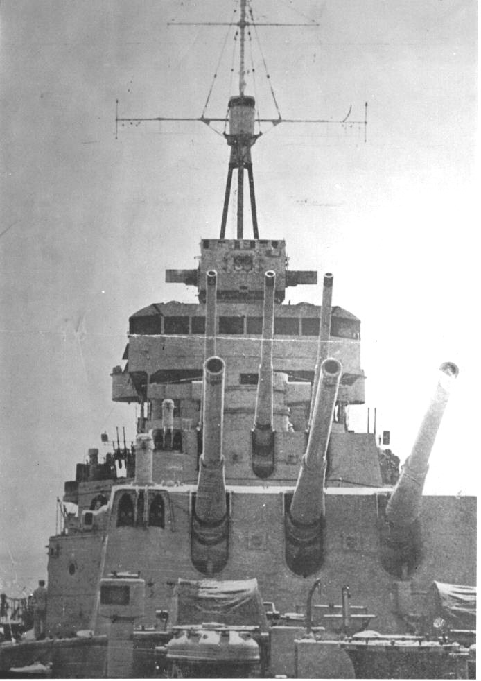 Canones ARA La Argentina (C-3)